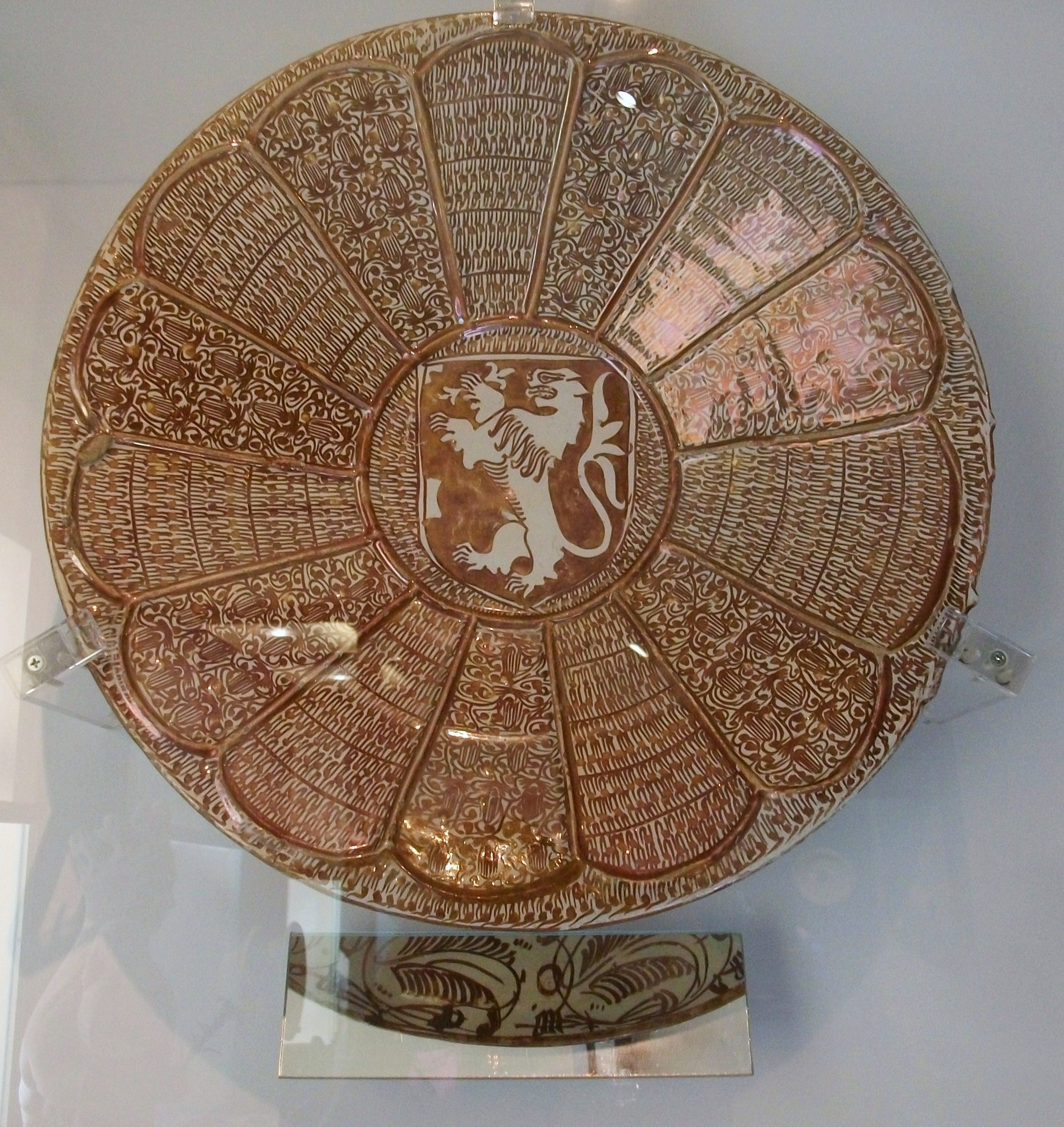 Plat de reflex daurat, Manises, s. XV - XVI, Museu de Ceràmica de València.